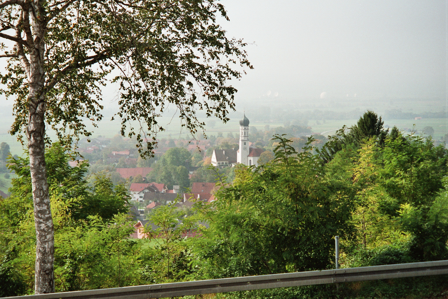 Der Blick auf Pähl, Bayern, Deutschland von der Hirschberg Alm